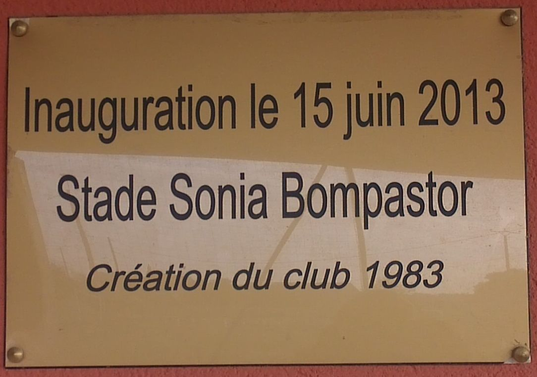 Plaque Stade de Foot - Montreuil-en-Touraine